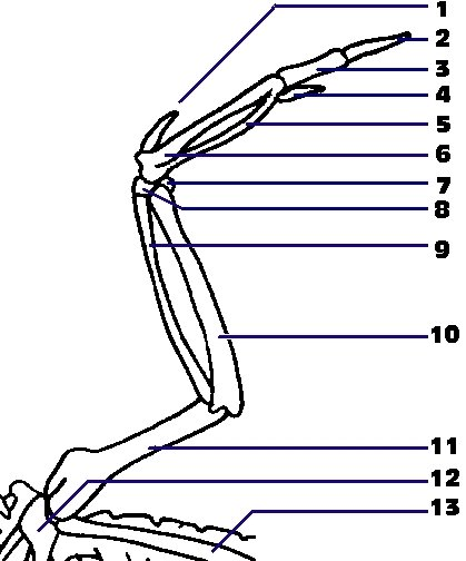 1. Digitus alulae 2. Terminale Phalange des Digitus major 3. Basale Phalange des Digitus Major 4. Digitus minor 5+6 Carpometacarpus (only one bone) 5. Os metacarpale minus 6. Os metacarpale majus 7. Os carpi Ulnare (Handwurzelknochenan der Elle) 8. Os carpi radiale (Handwurzelknochen an der Speiche) 9. Speiche (Radius) 10. Elle (Ulna) 11. Oberarmknochen (Humerus) 12. Rabenbein (Coracoid) 13. Schulterblatt (Scapula)